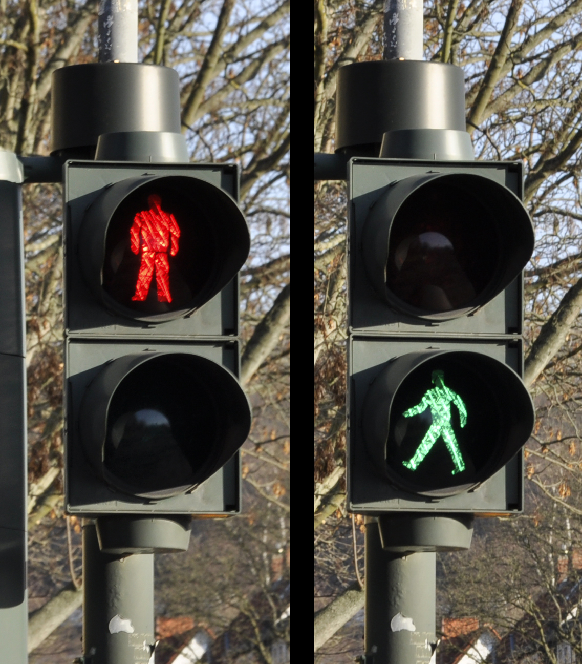 Fußgängerampel, Göttingen, Kreuzbergring/Von-Siebold-Straße, 31.12.2013. Fotos: Francisco Welter-Schultes.